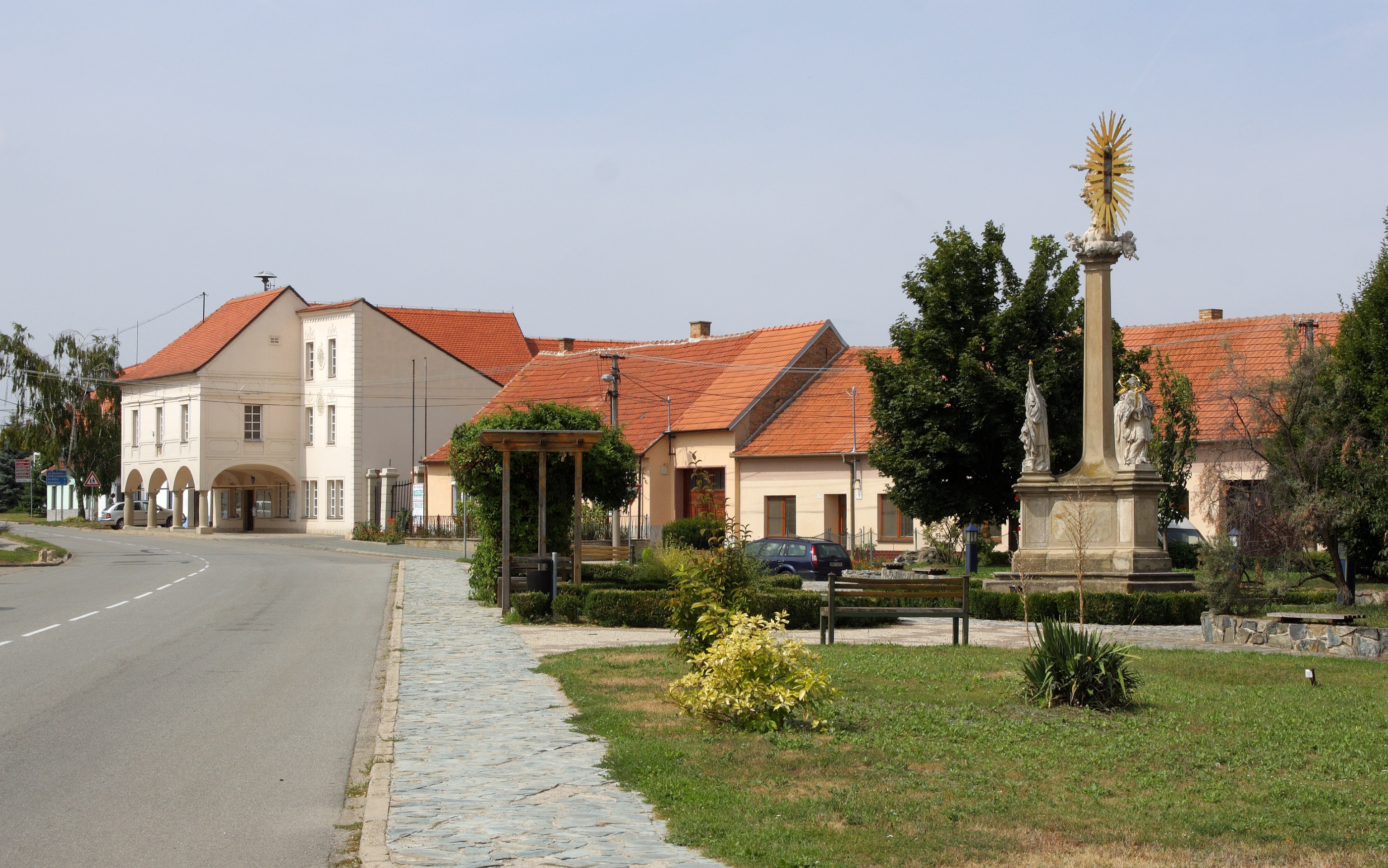 Blučina - náměstí Svobody s radnicí a mariánským sloupem.